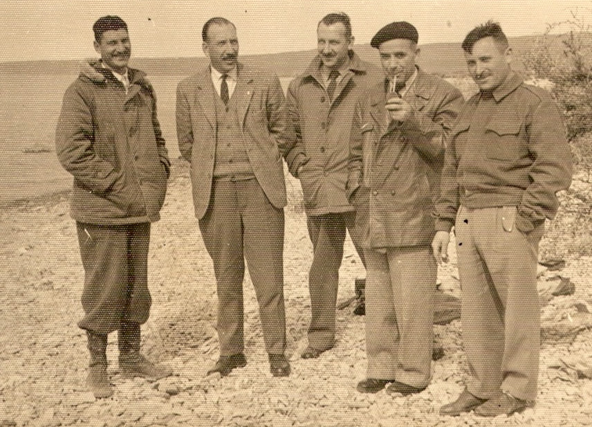 Victorio Angelelli tomando mate en campaña, junto con el Dr. Braulies y Etchart en la provincia de Chubut, Argentina.